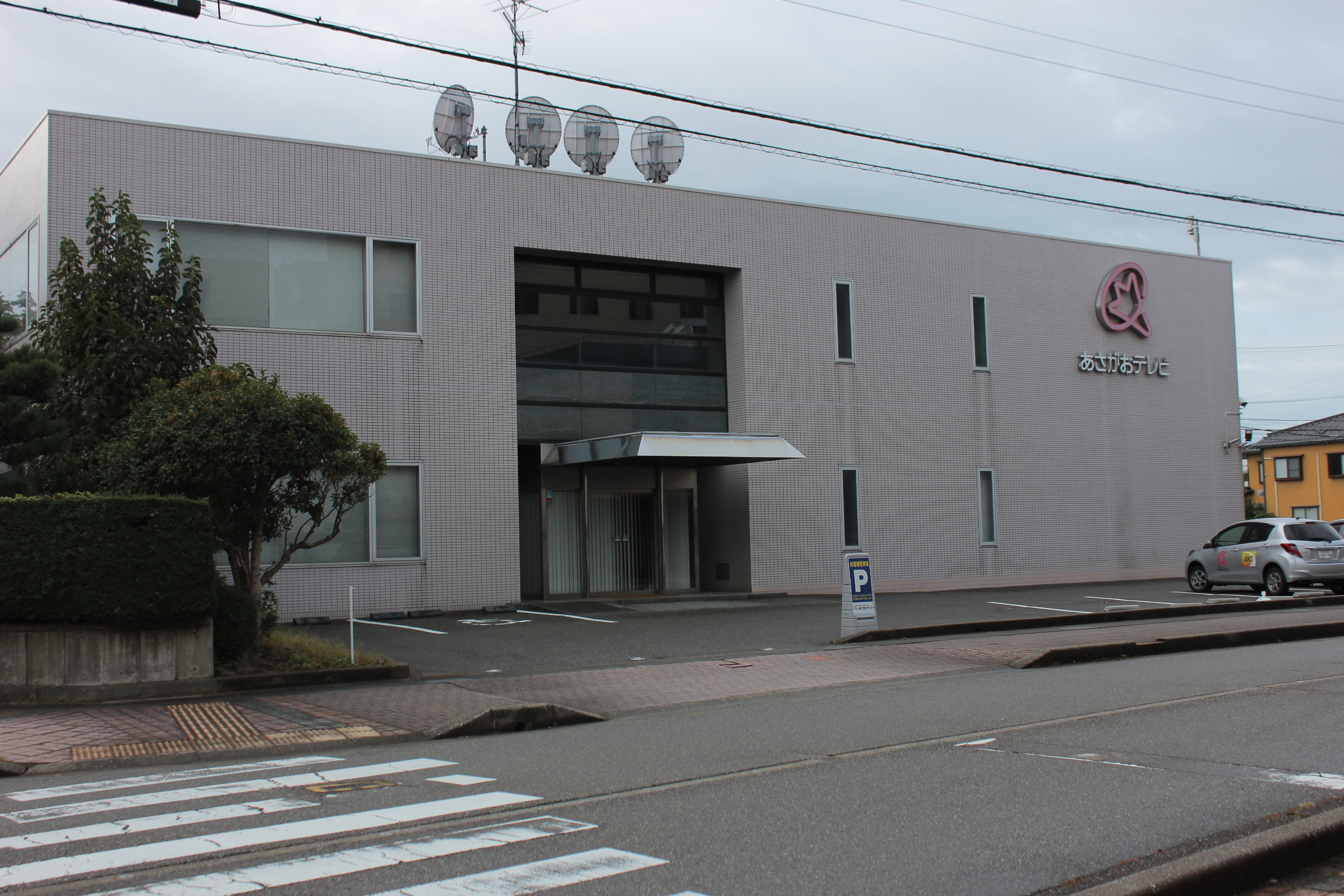 あさがおテレビ本社（石川県白山市） Canon EOS Kiss X5